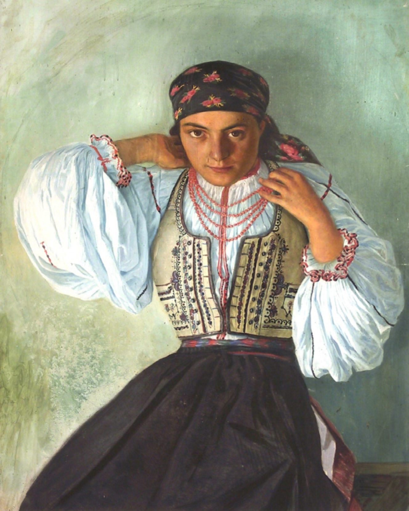 „Lina cu mărgele” - fotografie alb-negru, tempera/carton, 78,5 x 63 cm, nesemnat, nedatat, colecția Muzeului Brukenthal, inv. nr. 2682